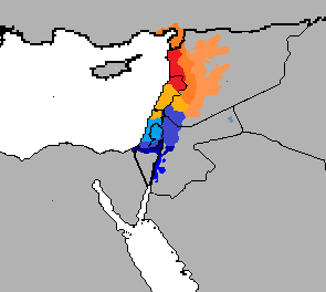 Variedades dialectales del árabe levantino.